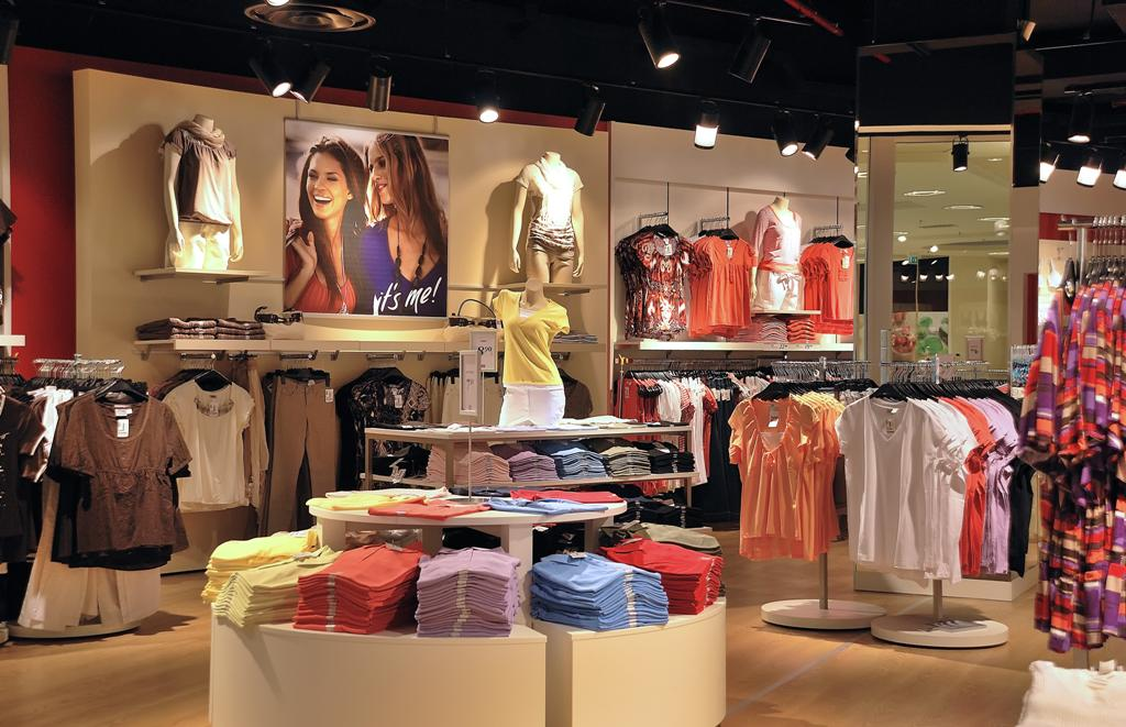 Filiale bonprix Innenaufnahme